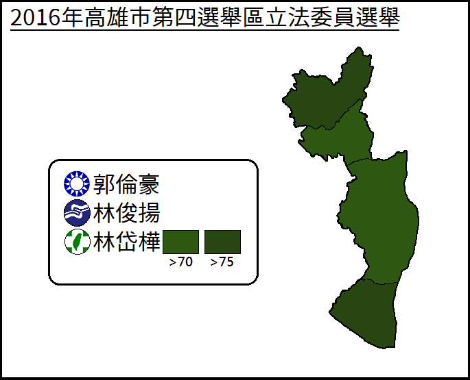 2016年高雄市第四選舉區立法委員選舉得票